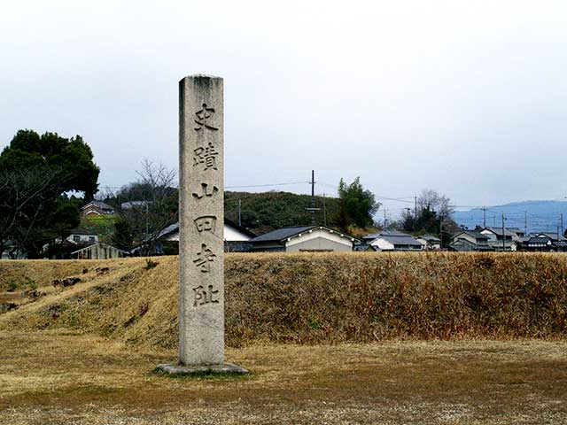 山田寺跡の史跡碑